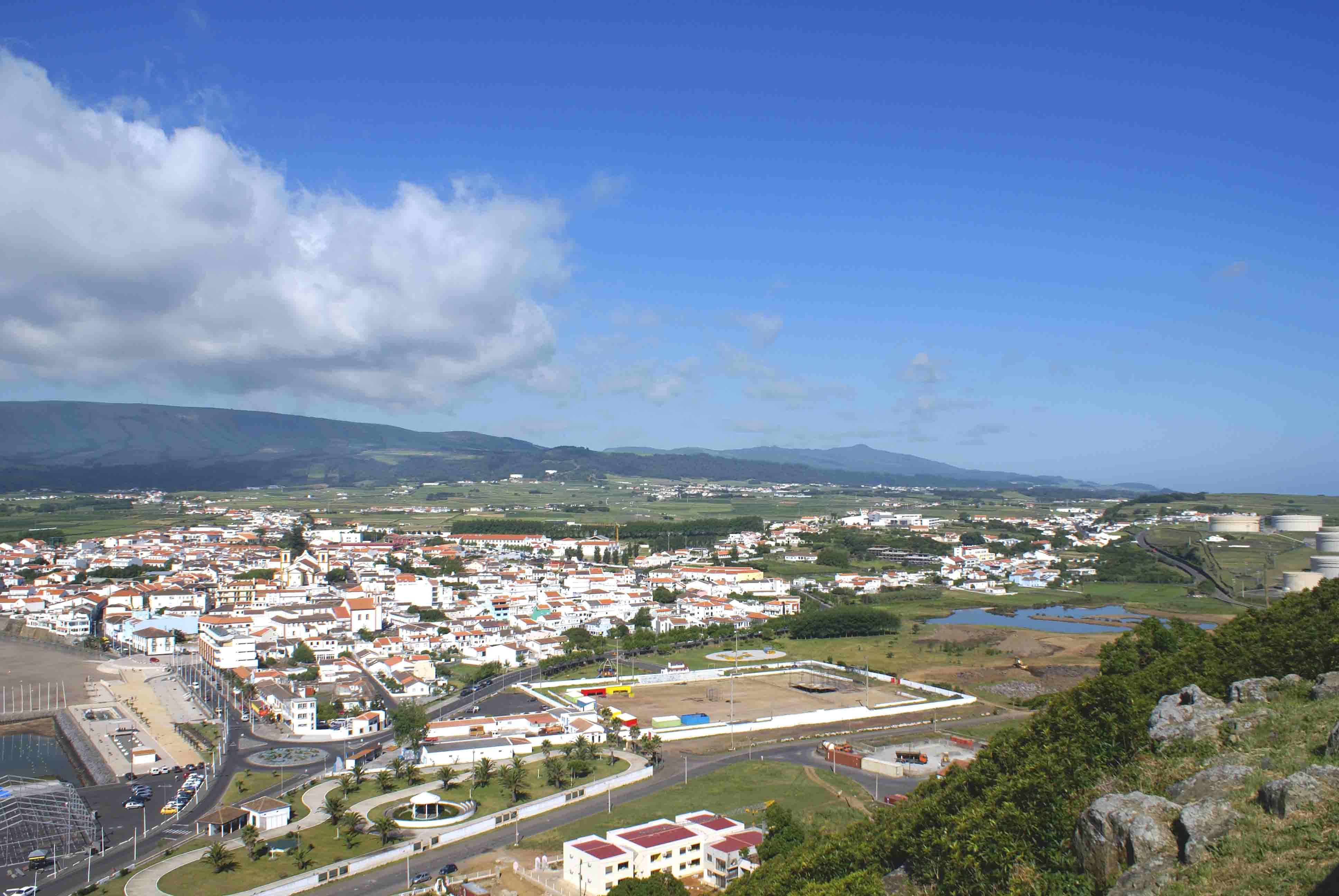 Praia da Vitória, ilha Terceira, Açores, Portugal.